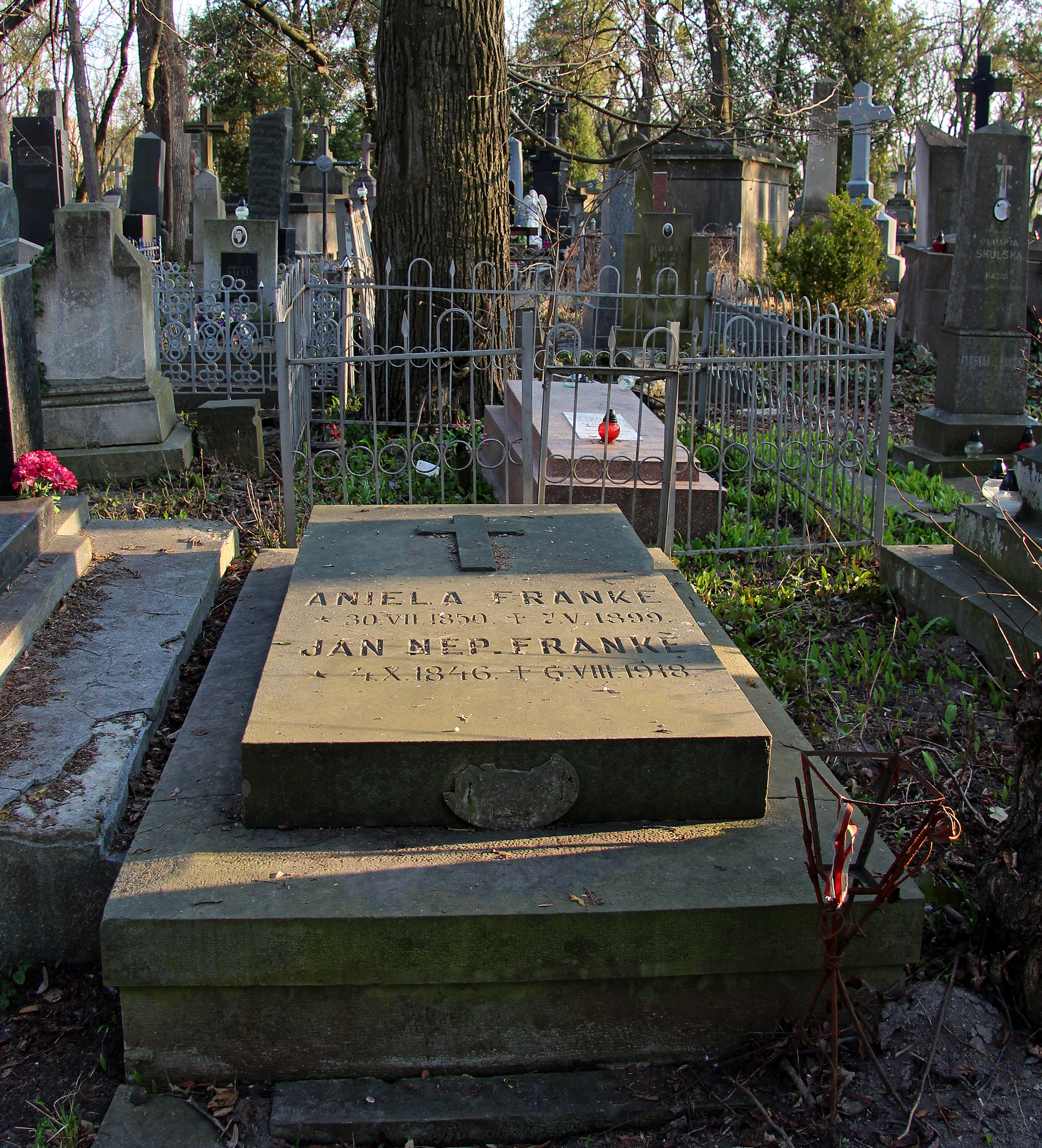 Надгробок родини Франке.Личаківський цвинтар ,поле № 57.